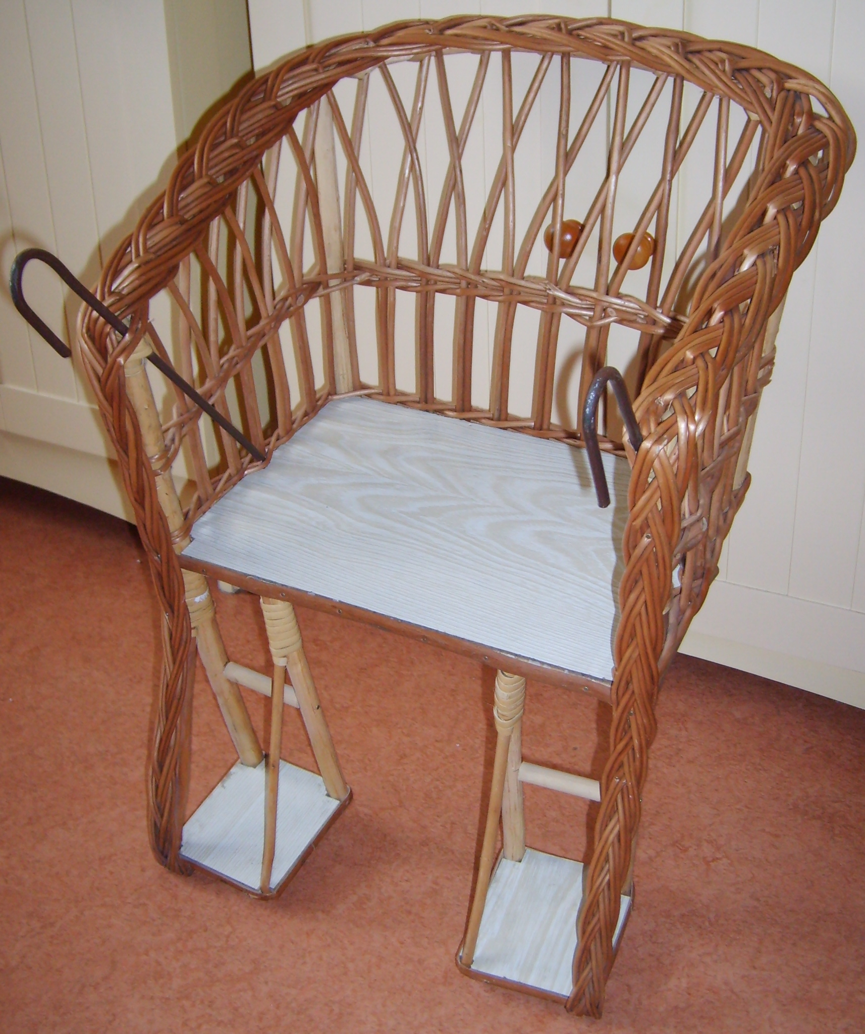 Kinderfahrradkorb für vorn